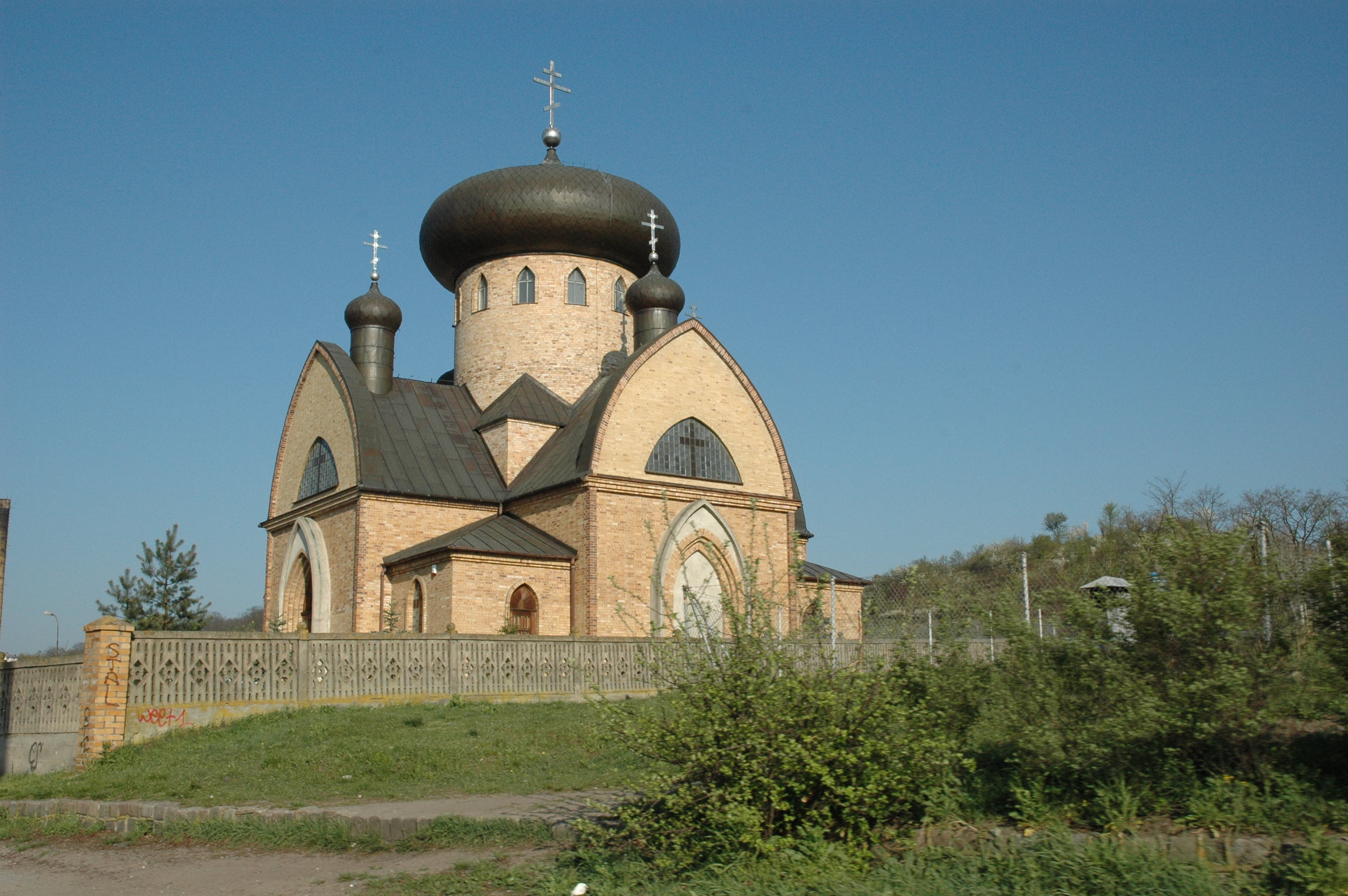 Cerkiew prawosławna Narodzenia Przenajświętszej Bogurodzicy w Gorzowie Wielkopolskim.